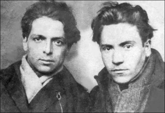 Христо Смирненски и Александър Добринов